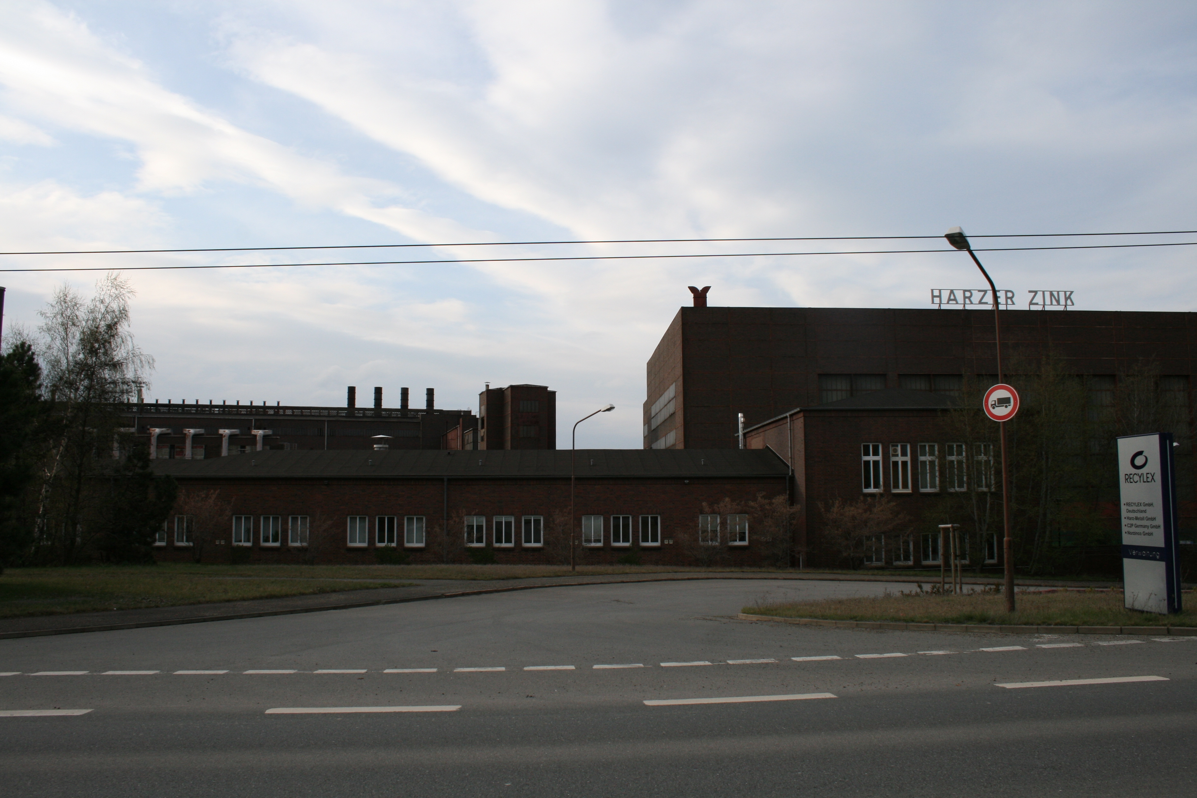 Verwaltung der Harz-Metall GmbH auf der ehem. Zinhütte Harlingerode